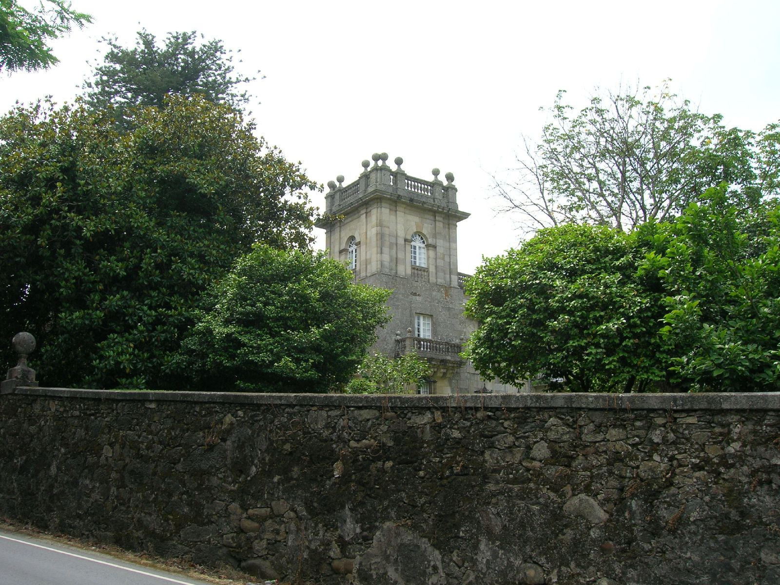 El pazo de Pena de Ouro es un edificio moderno de comienzos del siglo XX de estilo barroco compostelano, en el que colocaron piezas arqueológicas traídas de otros lugares, como el claustro románico trasladado en 1920 desde el monasterio de Toxosoutos.